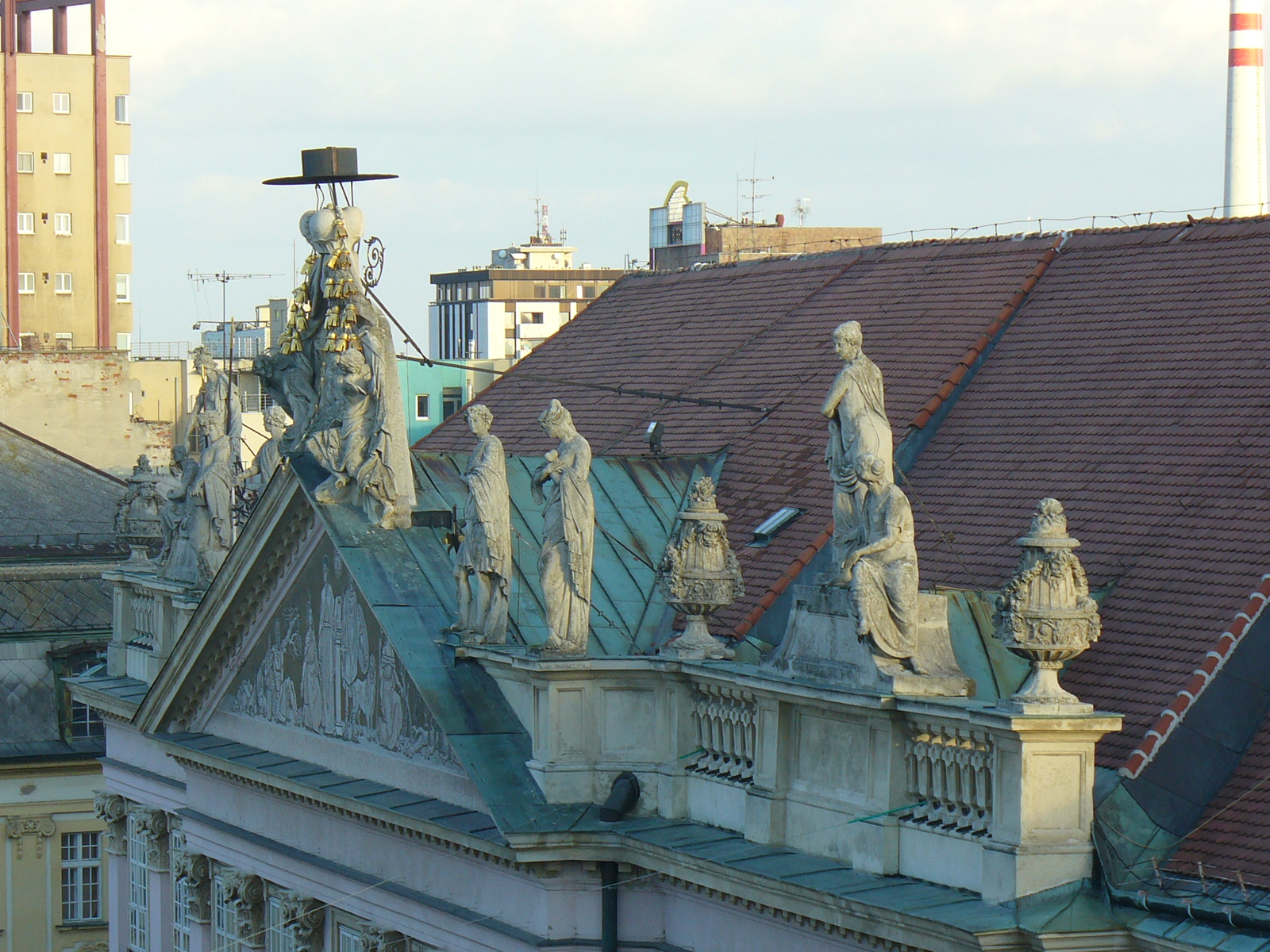 Górna część fasady Pałacu Prymasowskiego (Primaciálny palác) w Bratysławie This medium shows the protected monument with the number 101-184/1 (other) in the Slovak Republic.